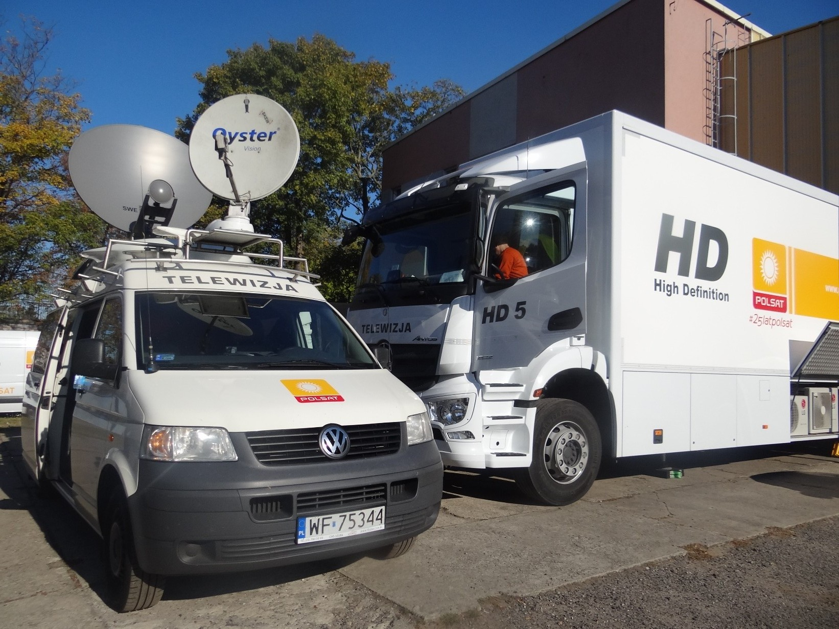 Telewizja Polsat